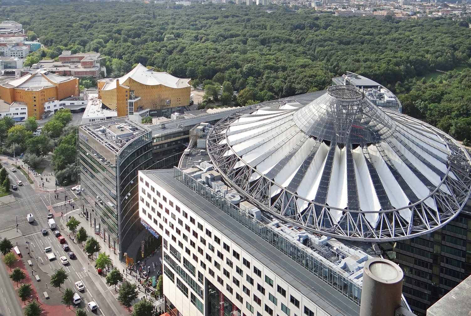 L'aire du Sony Center est située à proximité du parc Tiergarten, de la Potsdamer Platz, et du Kulturforum (au fond à gauche). Le Sony Center fait partie d'un ensemble de bâtiments construits par les plus grands architectes sur un immense terrain qui avait été rasé par les bombardements de la dernière guerre puis par le tracé du mur de Berlin. Le Sony Center est constitué de 8 bâtiments, transparents en acier et en verre, conçus en 1996-2000 par Helmut Jahn, architecte de Chicago. Ils se regroupent autour d'un forum ovale, pourvu de cafés, restaurants, cinémas, bureaux et musée du cinéma, le tout est recouvert d'un toit transparent dont la forme rappelle le mont Fuji.